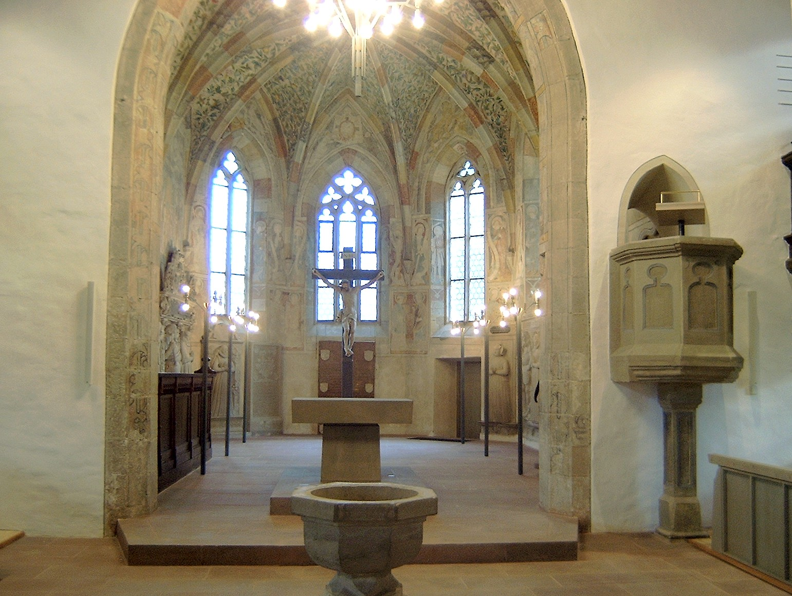 Hemmingen, Laurentiuskirche, Inneres